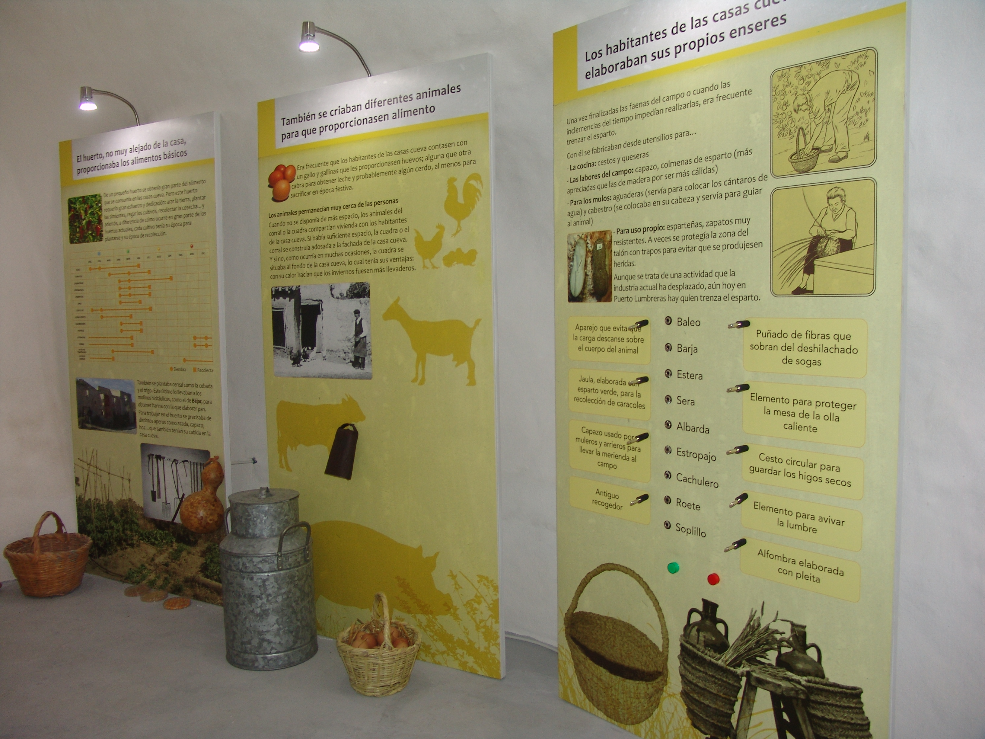 Paneles dedicados a la agricultura tradicional de Puerto Lumbreras